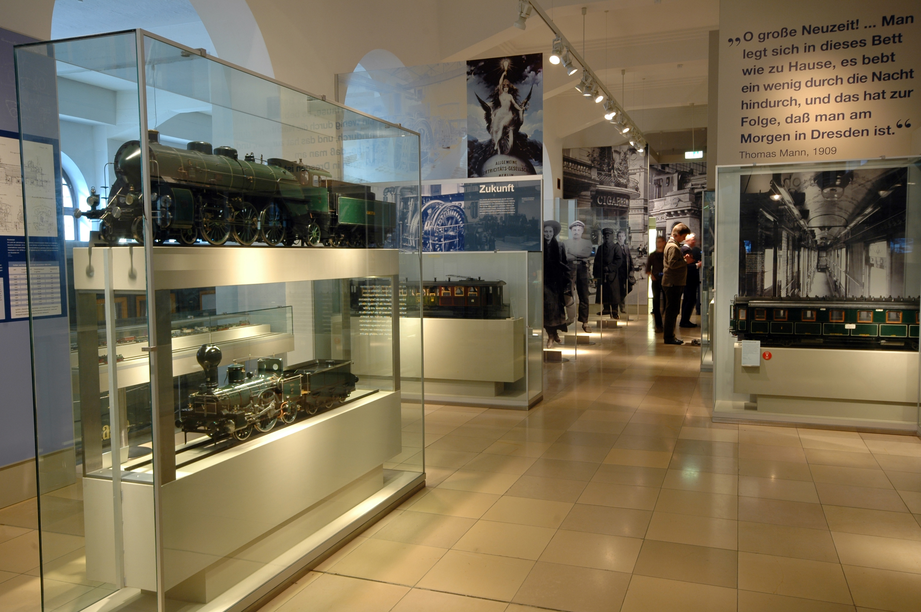 Verkehrsmuseum Nürnberg